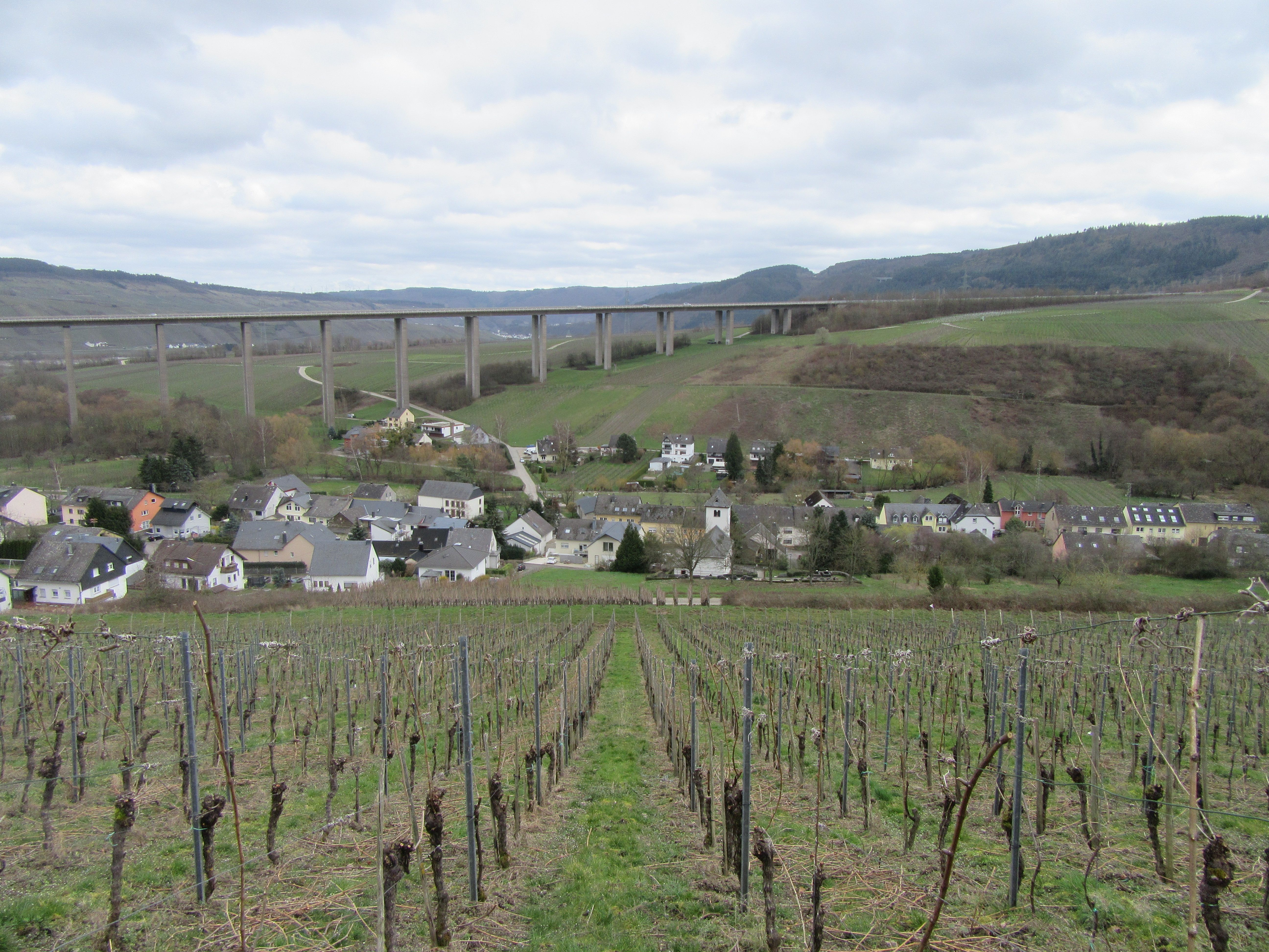 Fastrau bei Fell/Mosel